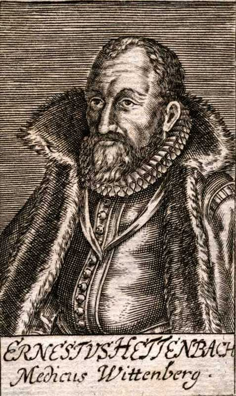 Kupferstich - Ernst(Ernestus) Hettenbach (1552-1616), deutscher Physiker und Mediziner